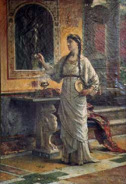 Roberto Bompiani - "Figura Pompeiana" Il Pittore è morto da oltre 70 anni ed in qualità di autore della fotografia ne autorizzo la diffusione. Spino 20:46, Nov 16, 2004 (UTC) Bompiani